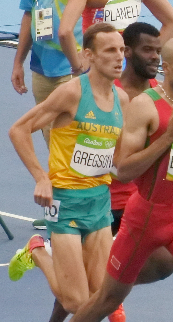 Rio 2016 - Eliminatórias 1500m Masculino